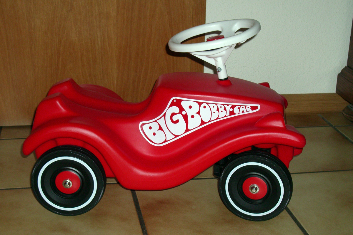 Selbst fotografiert